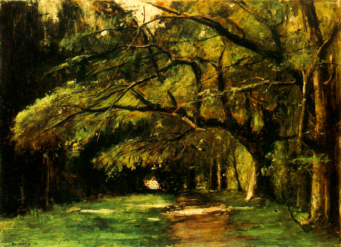 Munkácsy Mihály: A Colpachi park